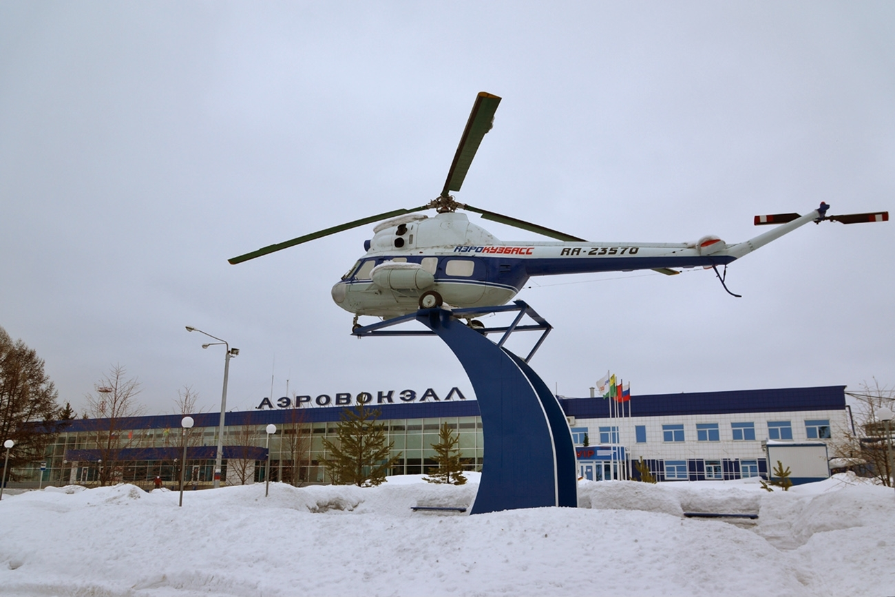 Spichenkovo Airport (Mil Mi-2 (RA-23570))